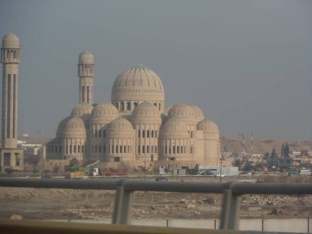 جامع الموصل الكبير (سابقًا جامع صدام) سنة 1432 هـ / 2011 م